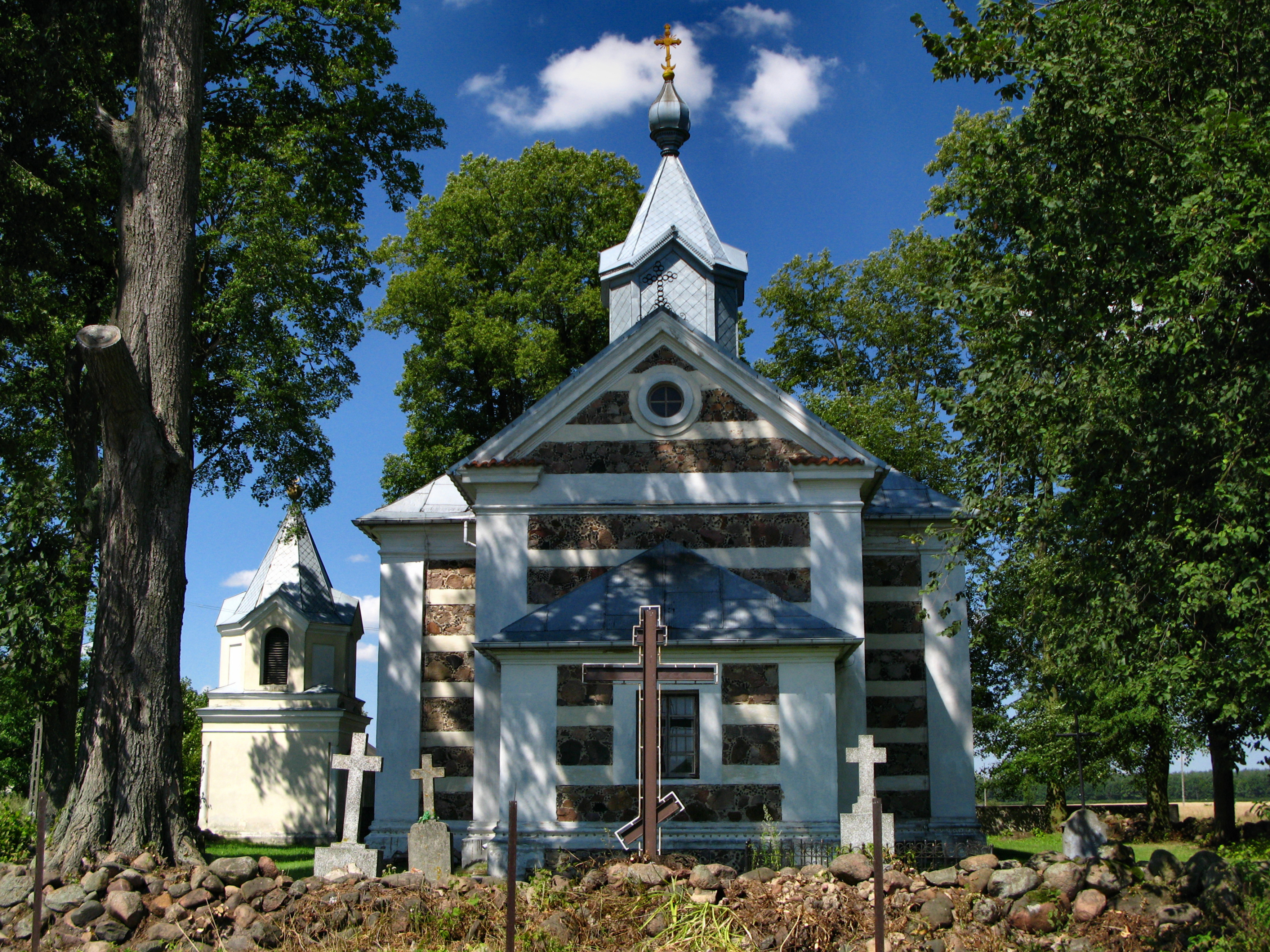 Cerkiew prawosławna p.w. św. Michała Archanioła (1862)Dzwonnica (4 ćw. XIX)Ogrodzenie Nosów, gmina Leśna Podlaska